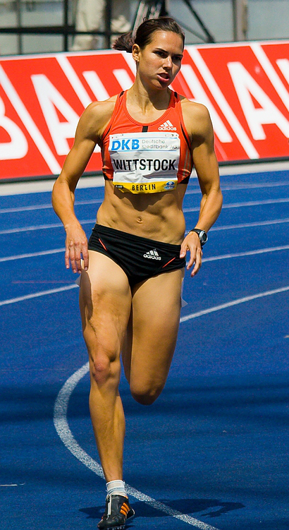 Estie Wittstock, Claudia Hoffmann